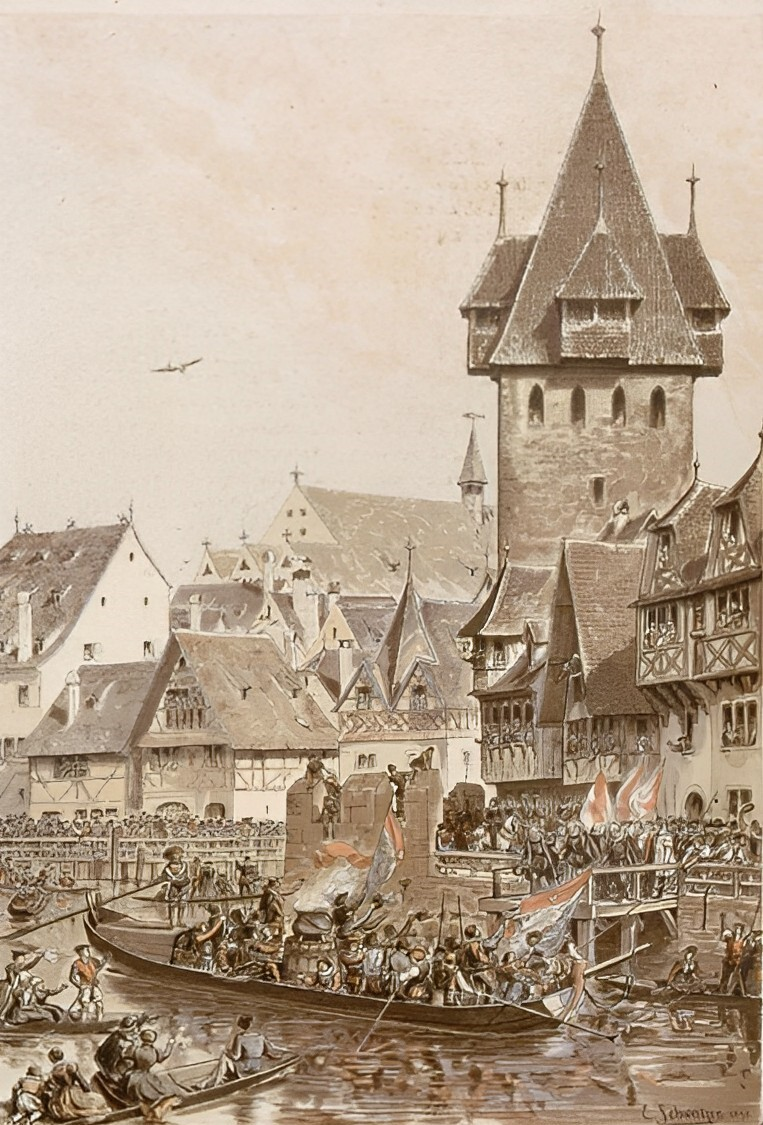 Dessin représentant l’arrivée des Zurichois à Strasbourg sur le Rheingiessen en 1576.